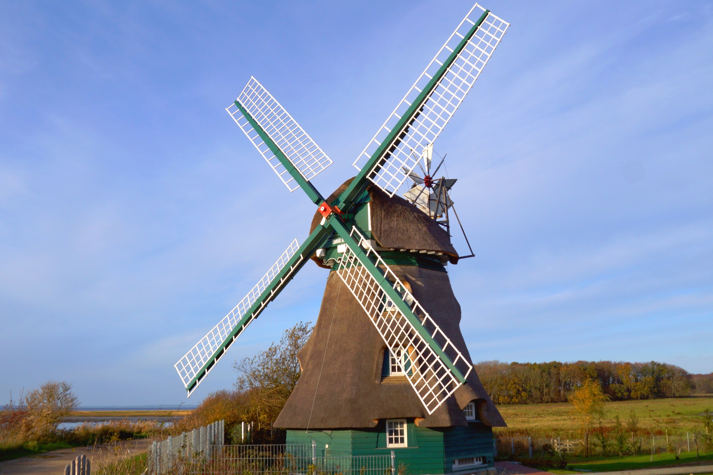 Windmühle Charlotte vom Typ Grundsegler oder Erdholländer, ehemals wirtschaftlich als Korn- und Schöpfmühle genutzt. Um 2013 aufwändig samt Reetdach instandgesetzt. Nach ihr Art nicht allzu häufig anzutreffende Mühle im Nordosten von Schleswig-Holstein in Geltinger Birk, Gemeinde Nieby, nahe Gelting. Foto Wolfgang Pehlemann DSC09766